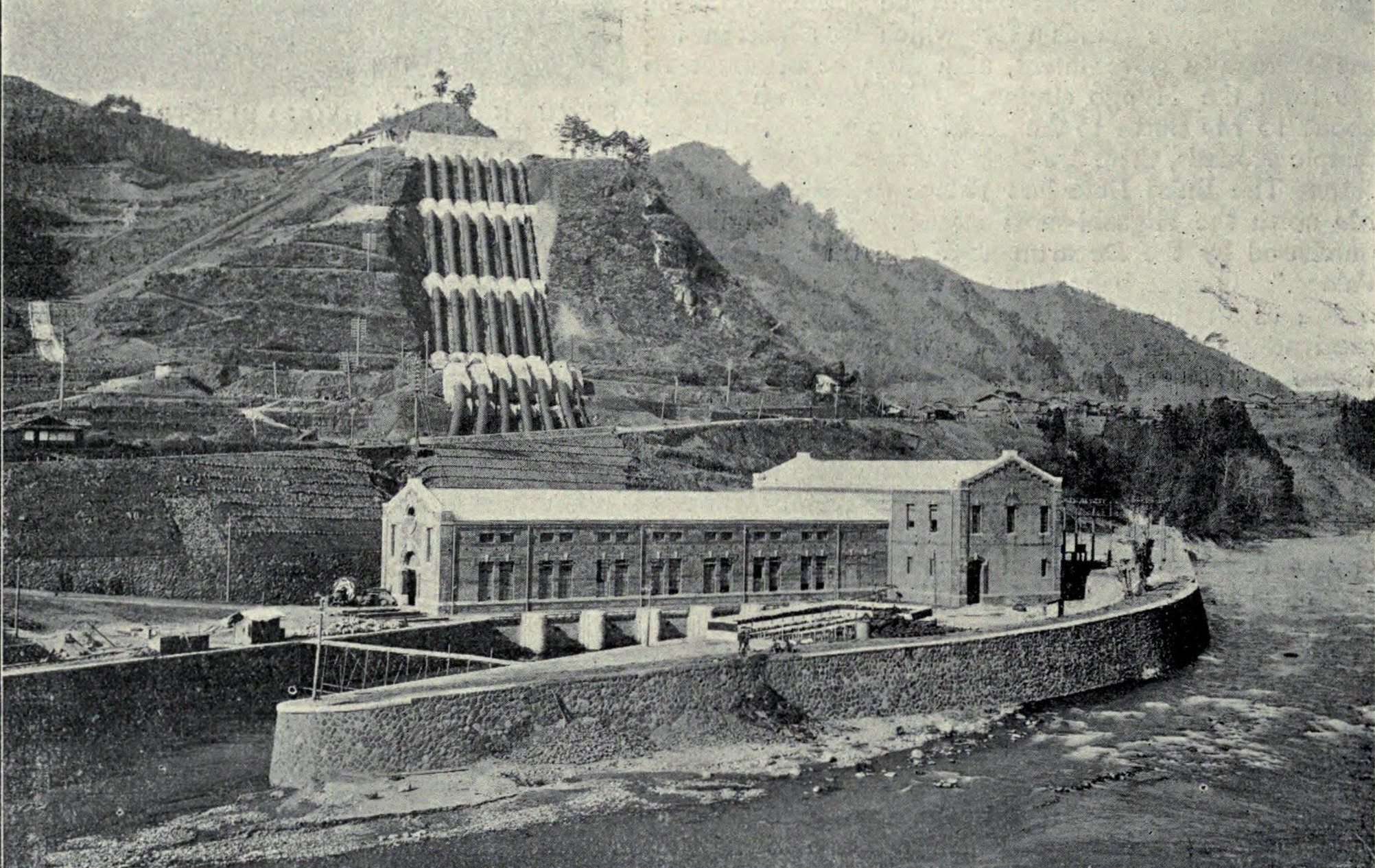 東京電灯の発電所